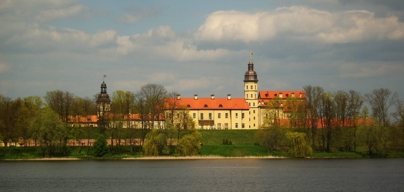 Нясвіж і Нясвіжскі замак